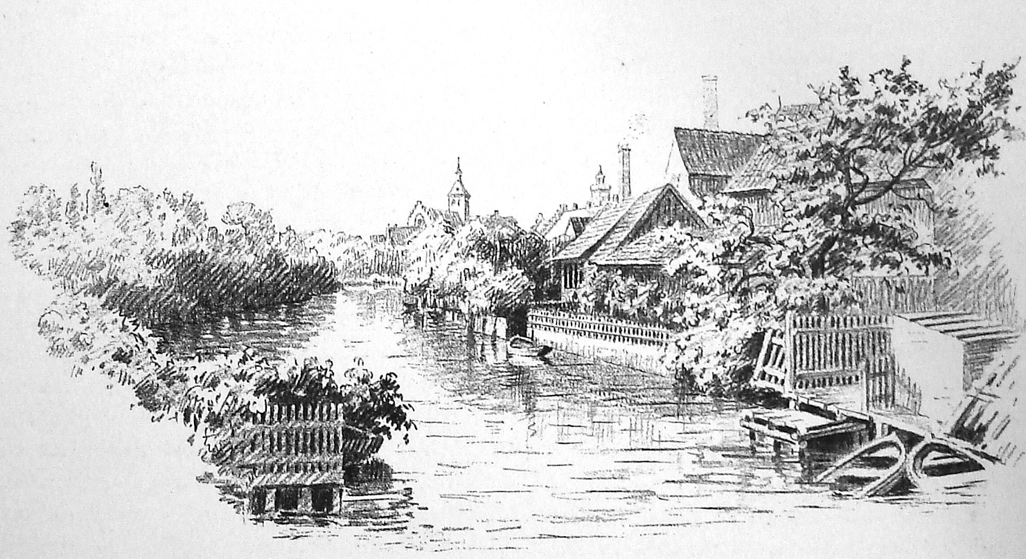 Odense å